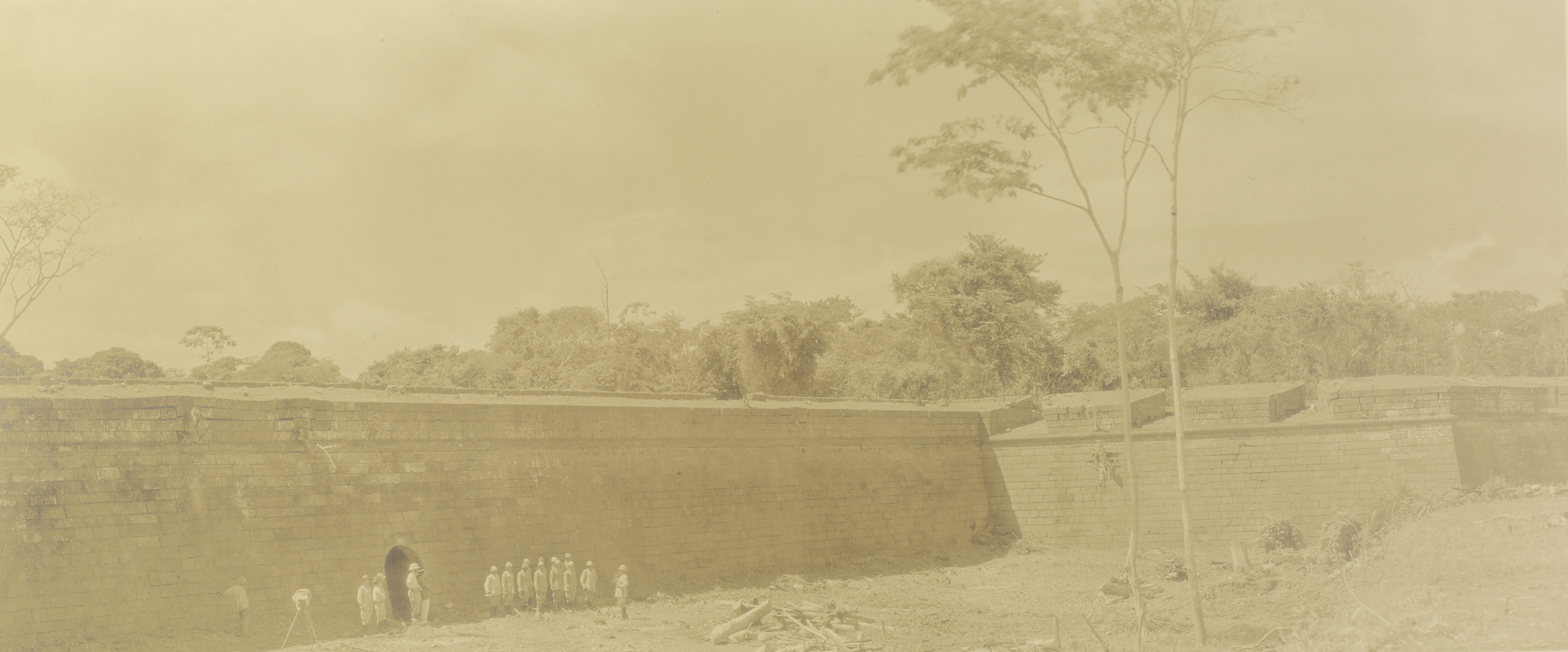 Imagem do Fundo Ministério da Guerra, do Arquivo Nacional